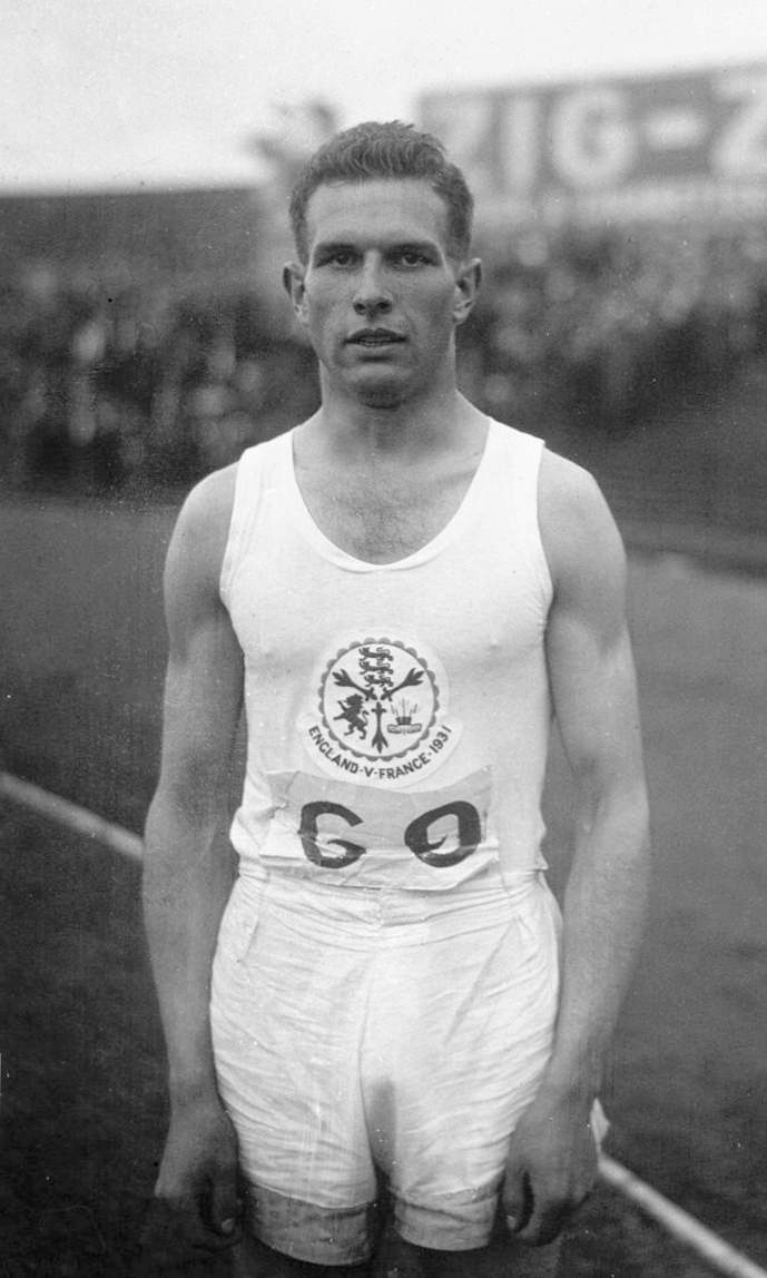 Colombes : athlétisme, France-Angleterre : Reid 400 m (portrait à 2 m) : [photographie de presse] / Agence Meurisse